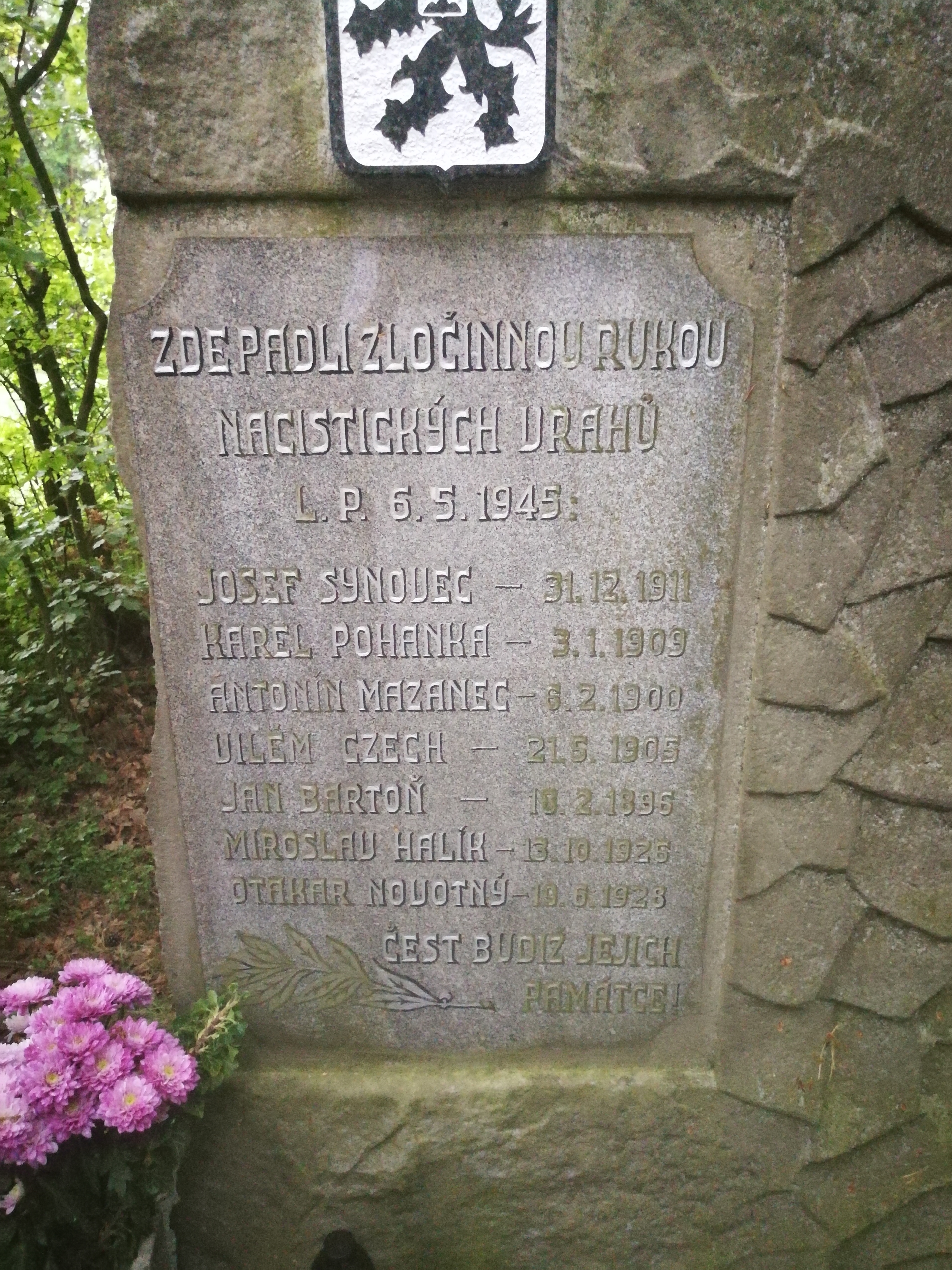 Jedouchov, pomník popravených 6.5.1945